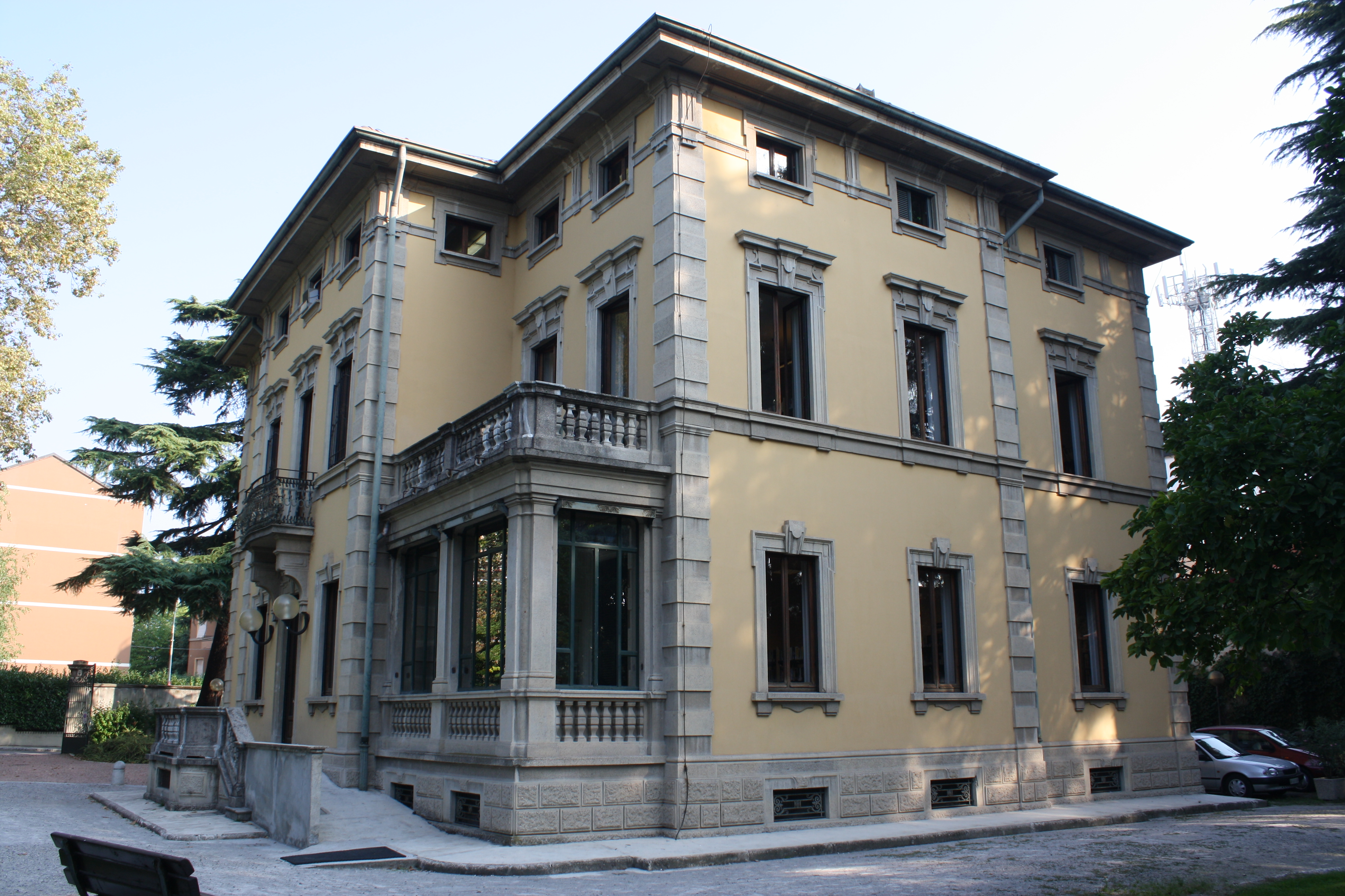 Biblioteca Civica "Augusto Marinoni" a Legnano This is a photo of a monument which is part of cultural heritage of Italy.